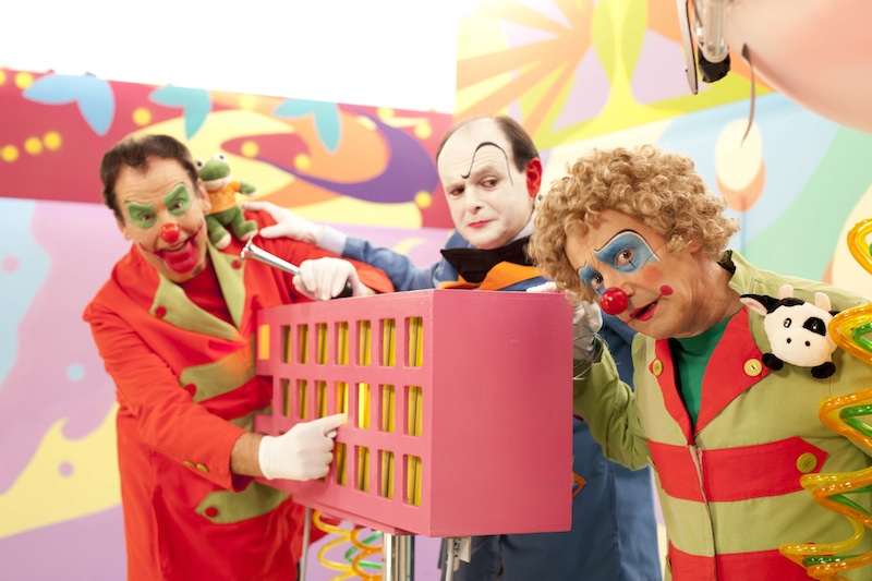 'Sagarra da apple' saioa. Euskal Telebista.